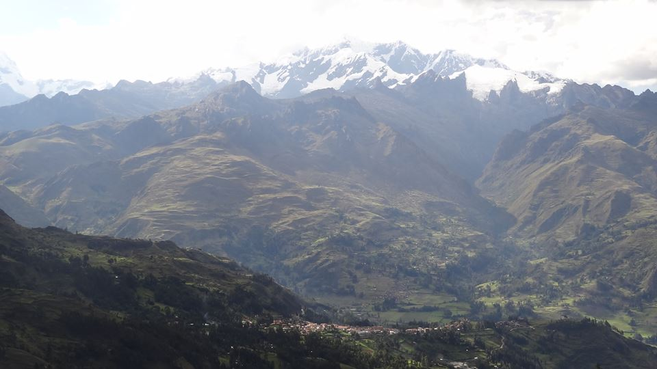 Vista de Chacas con el macizo Contrahierbas.